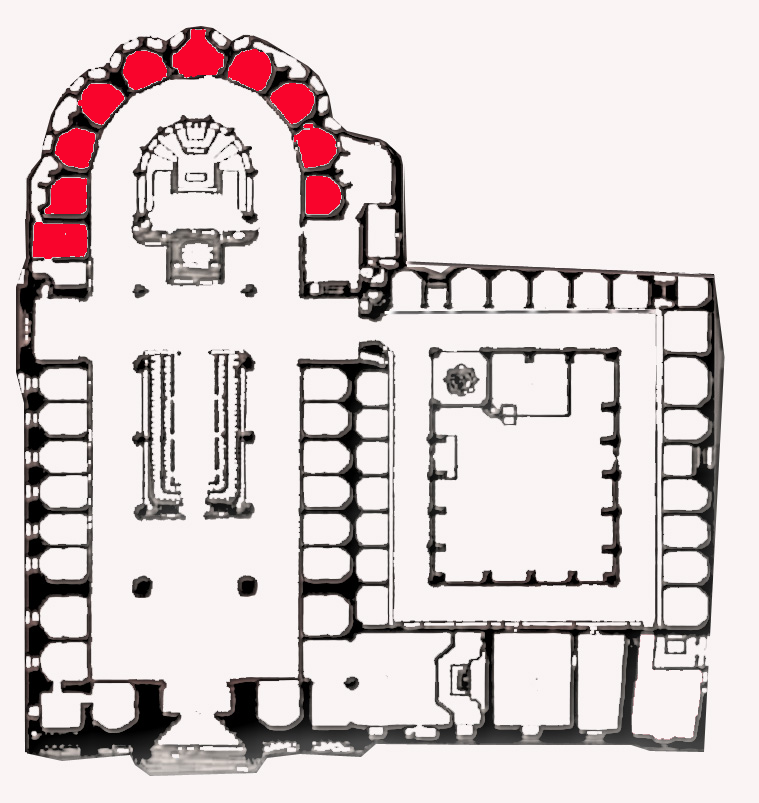 Situació de les capelles del costat de l'Epístla dins de la catedral de Barcelona